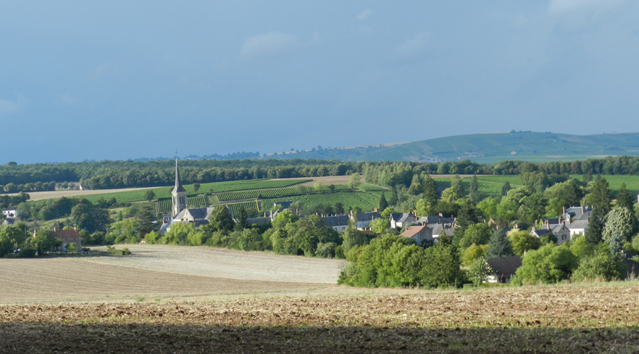 Vue générale de Veaugues, depuis la lisière des bois des Hospices